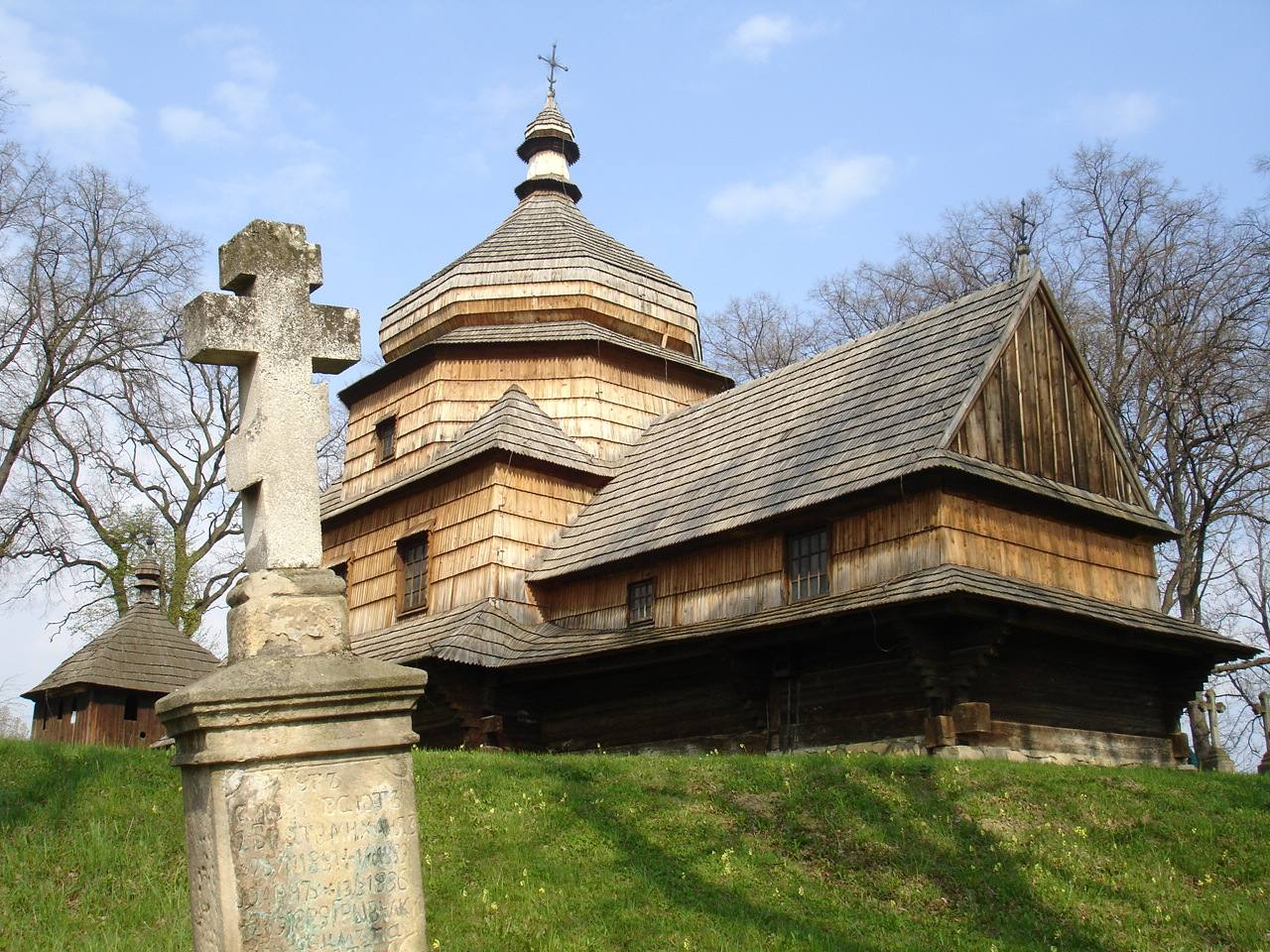 Kościół w Czerteżu